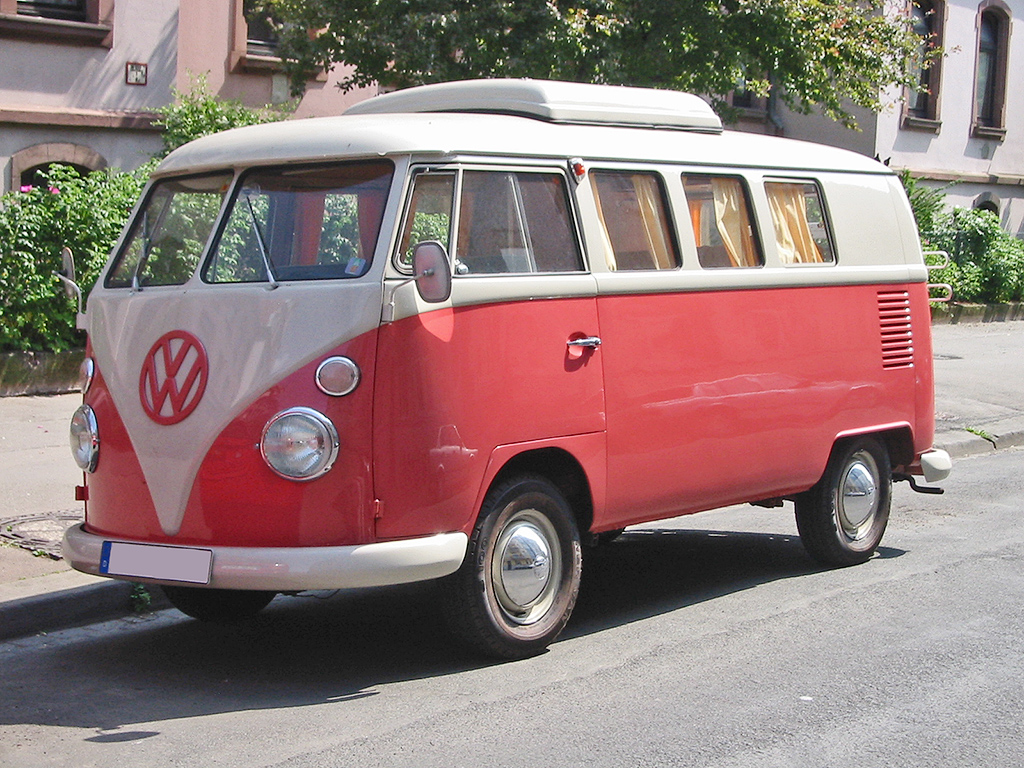 VW Bus T1